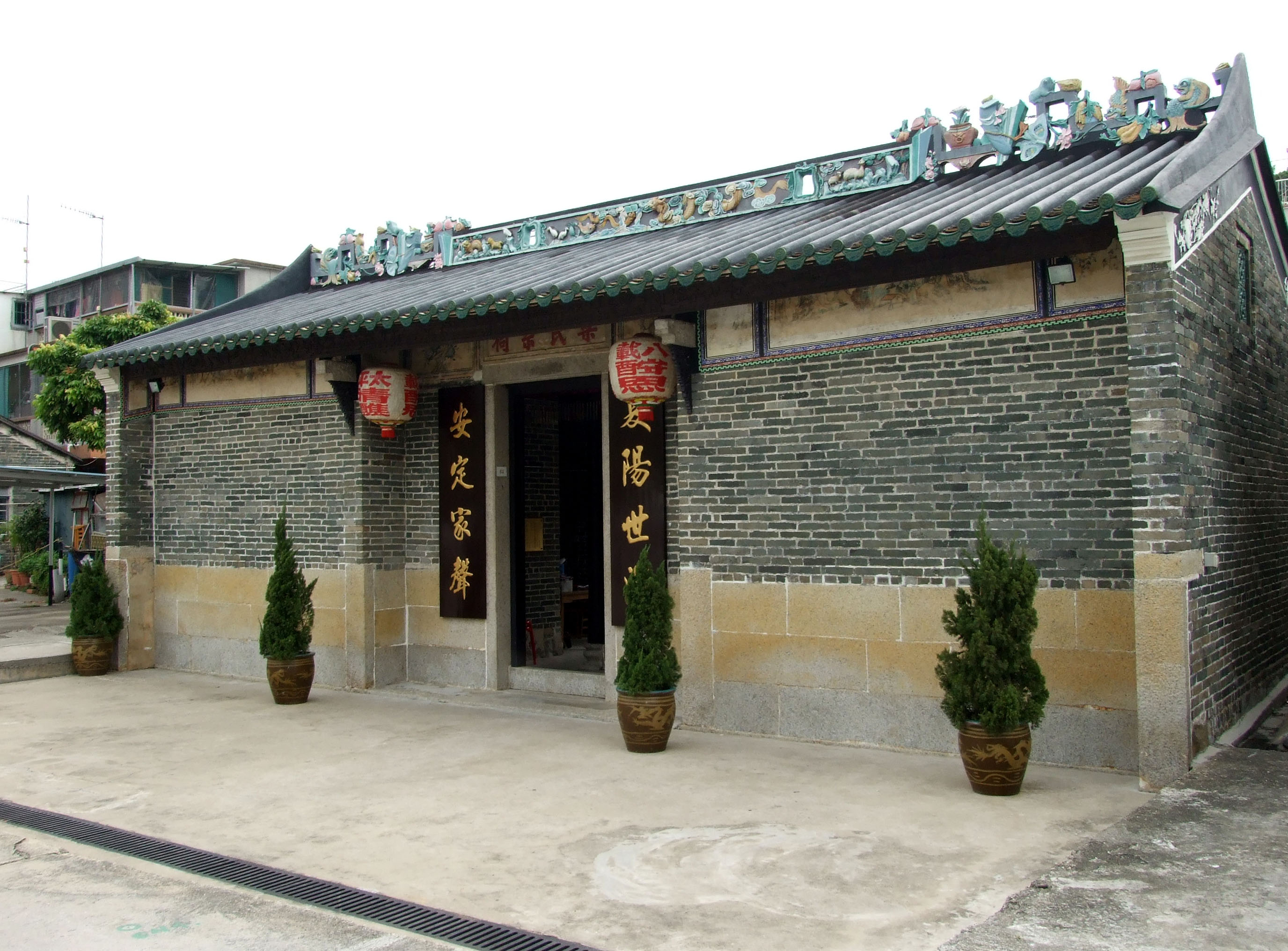 中文（香港）: 元崗村梁氏宗祠